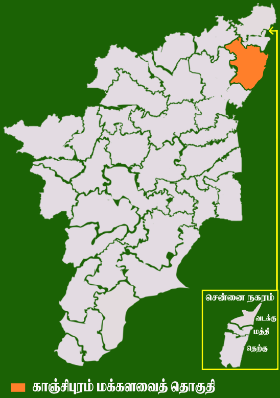 தமிழக வரைபடத்தில் உள்ள காஞ்சிபுரம் மக்களவைத் தொகுதி